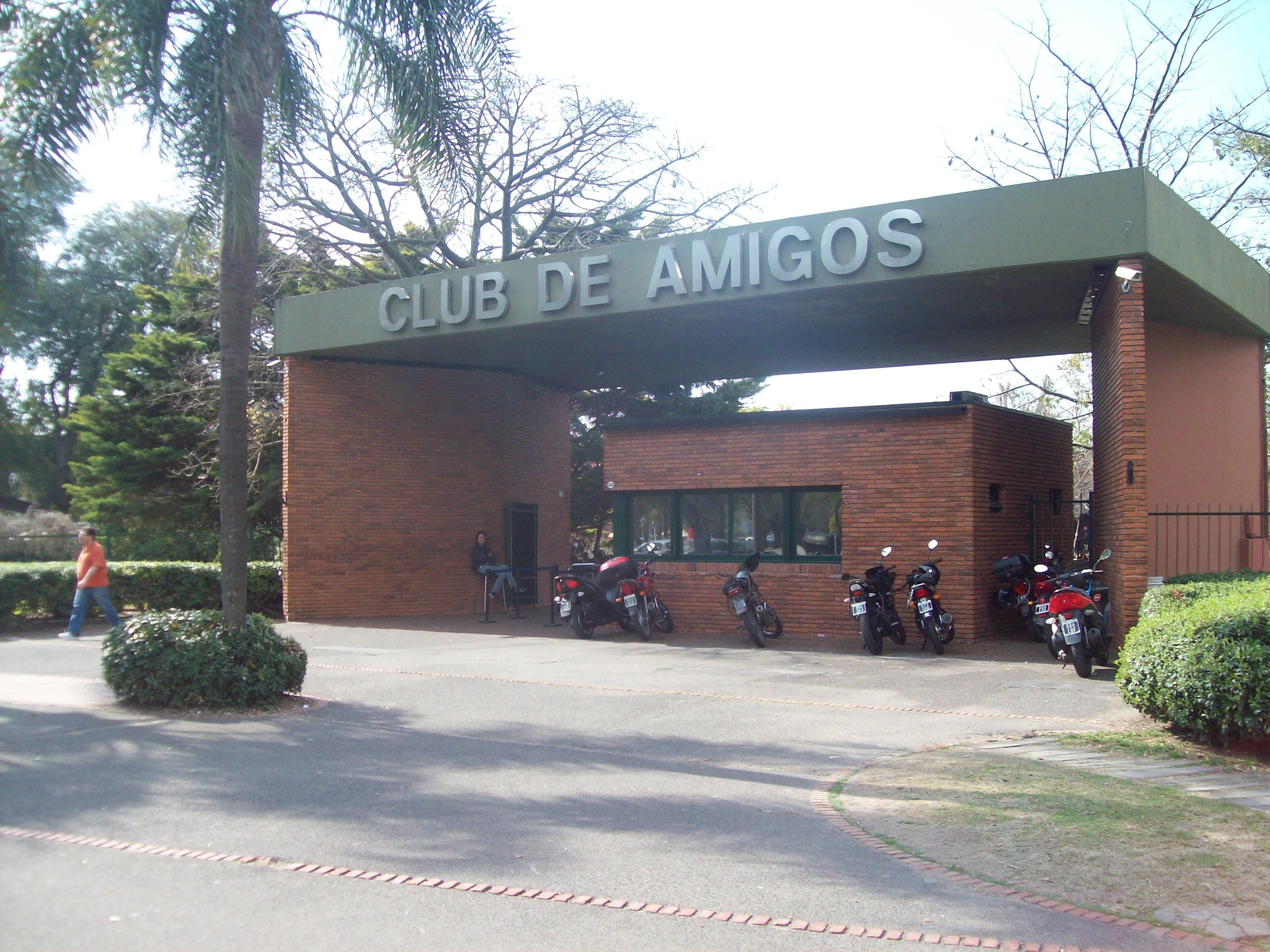 Entrada al Club de Amigos